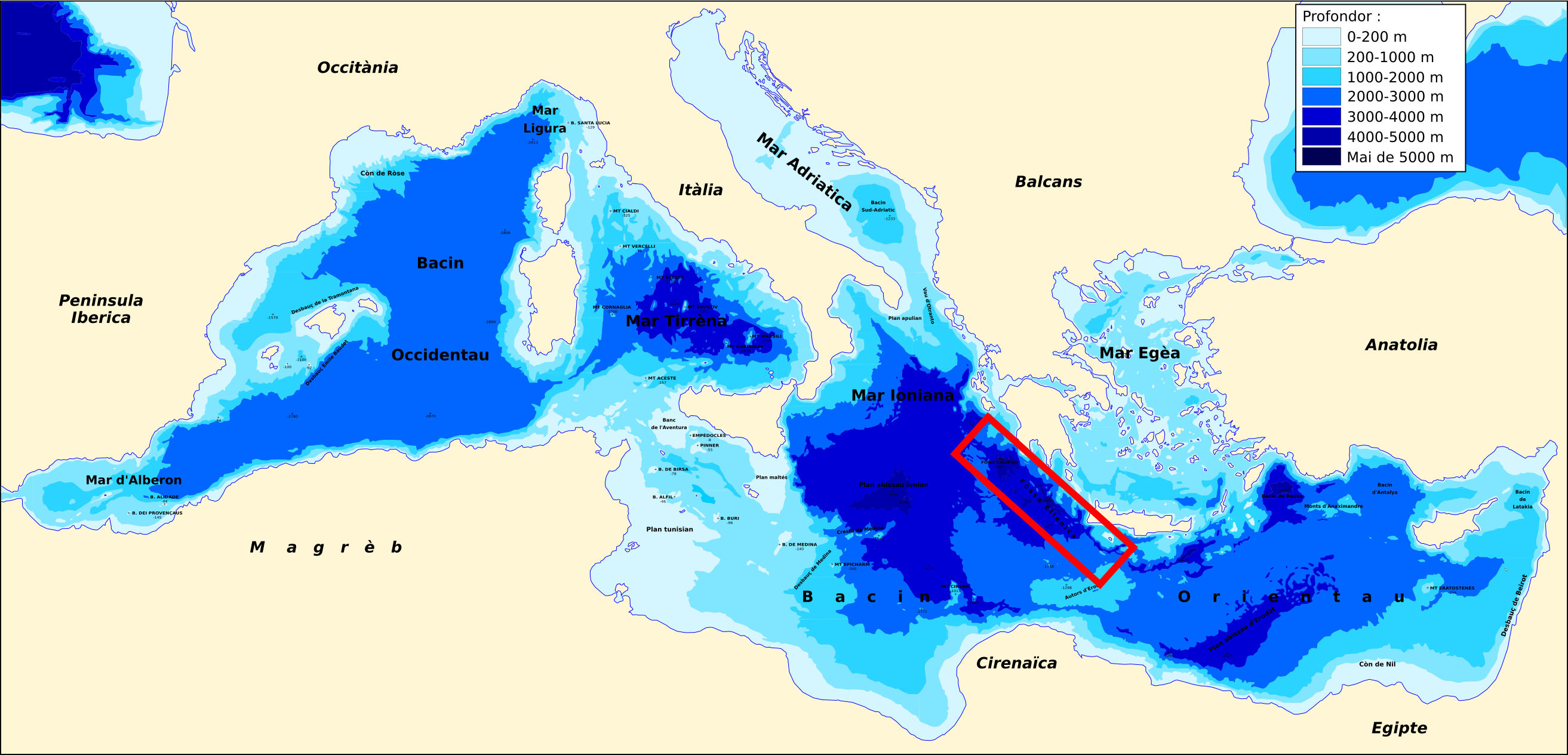 Localizacion dei Fòssas Ellenicas.